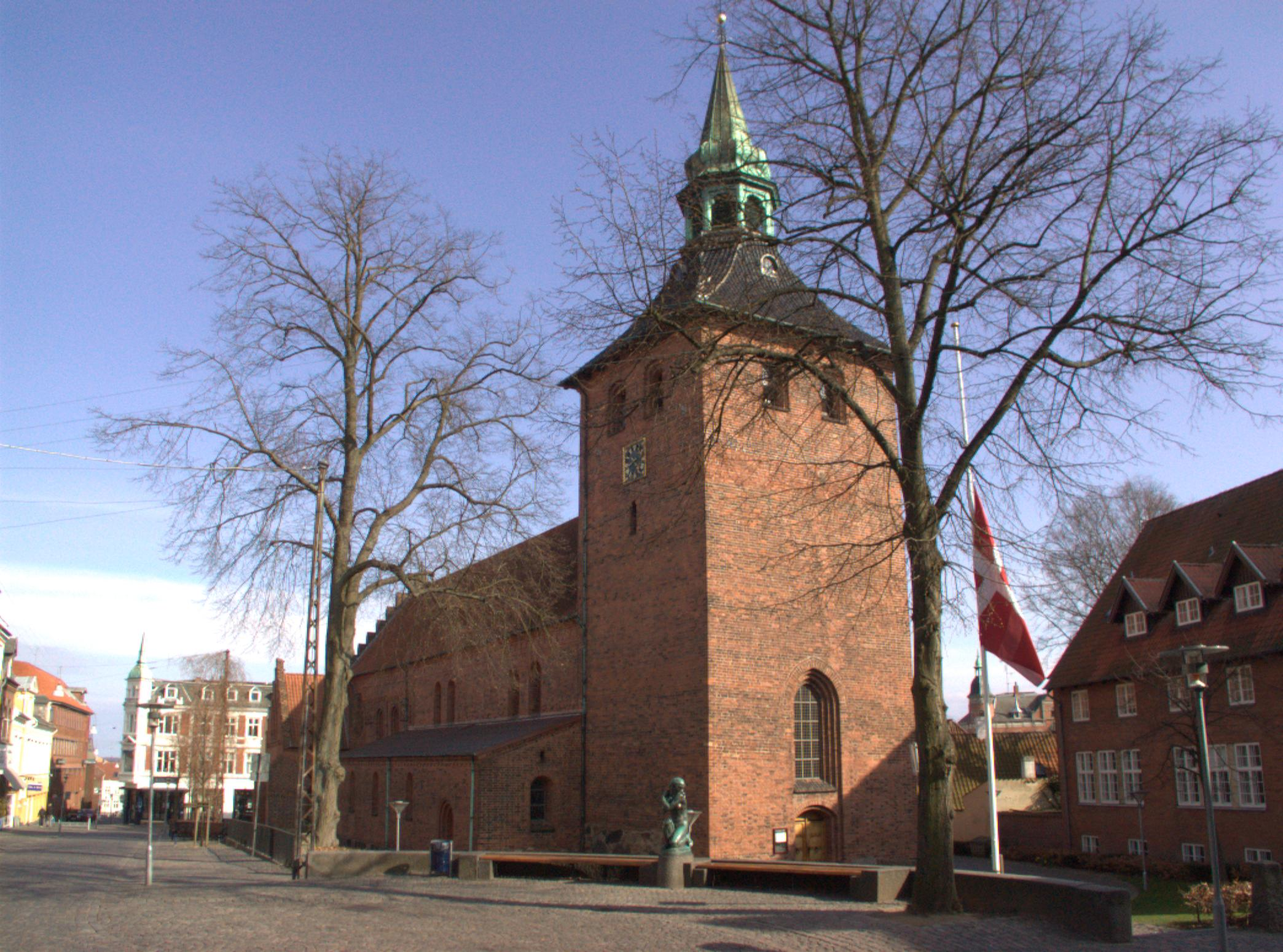 Sankt Nikolaj Kirke i Svendborg / Sankt Nikolaj Kirke is a church in Svendborg, Funen, Denmark